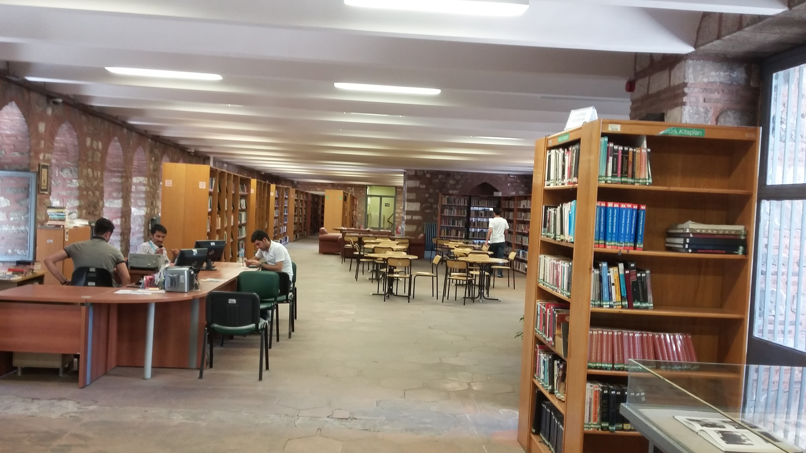 Ordu Caddesi'nde bulunan İstanbul Orhan Kemal İl Halk Kütüphanesi birinci katından bir görüntü.